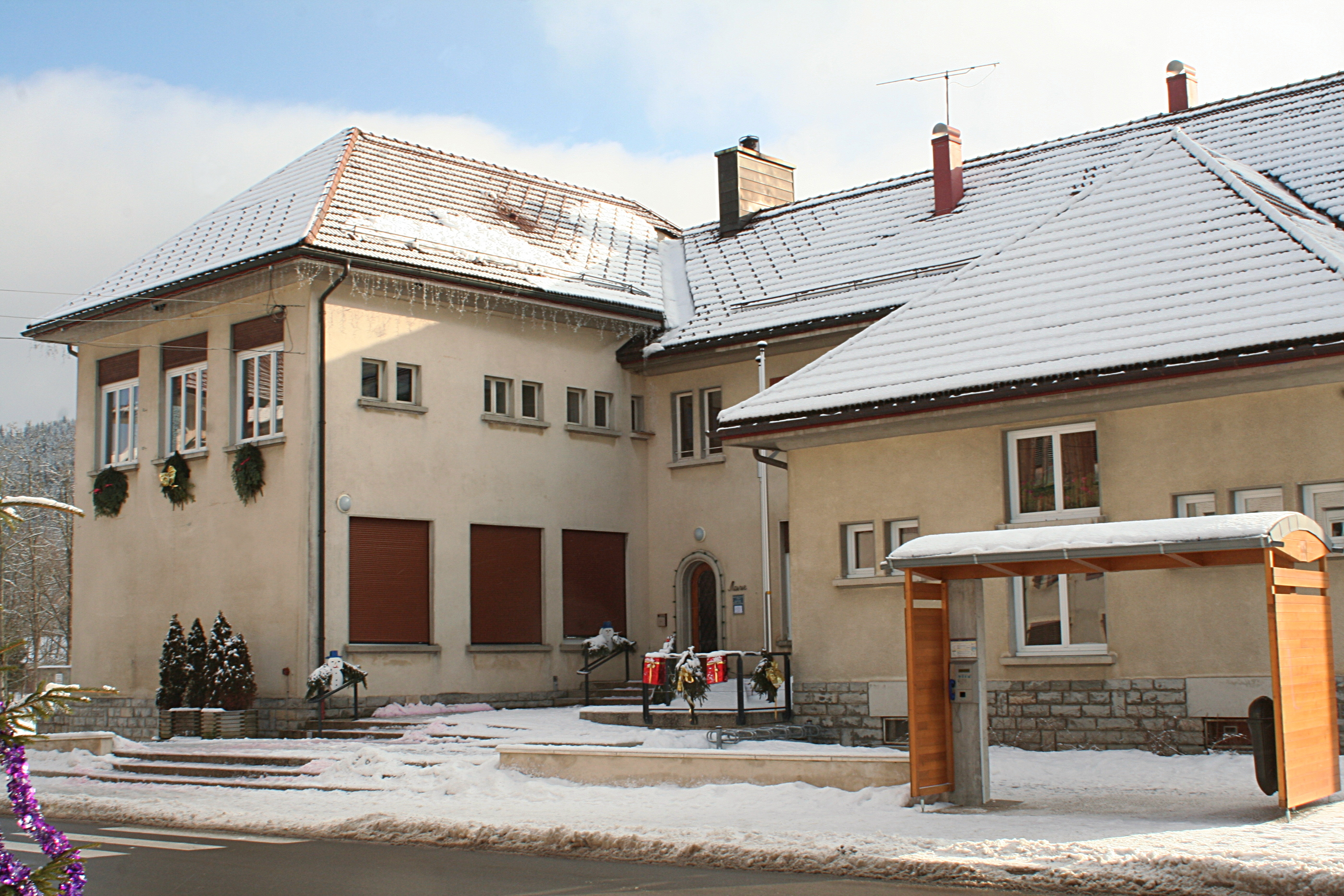 Mairie de Malbuisson sous la neige.